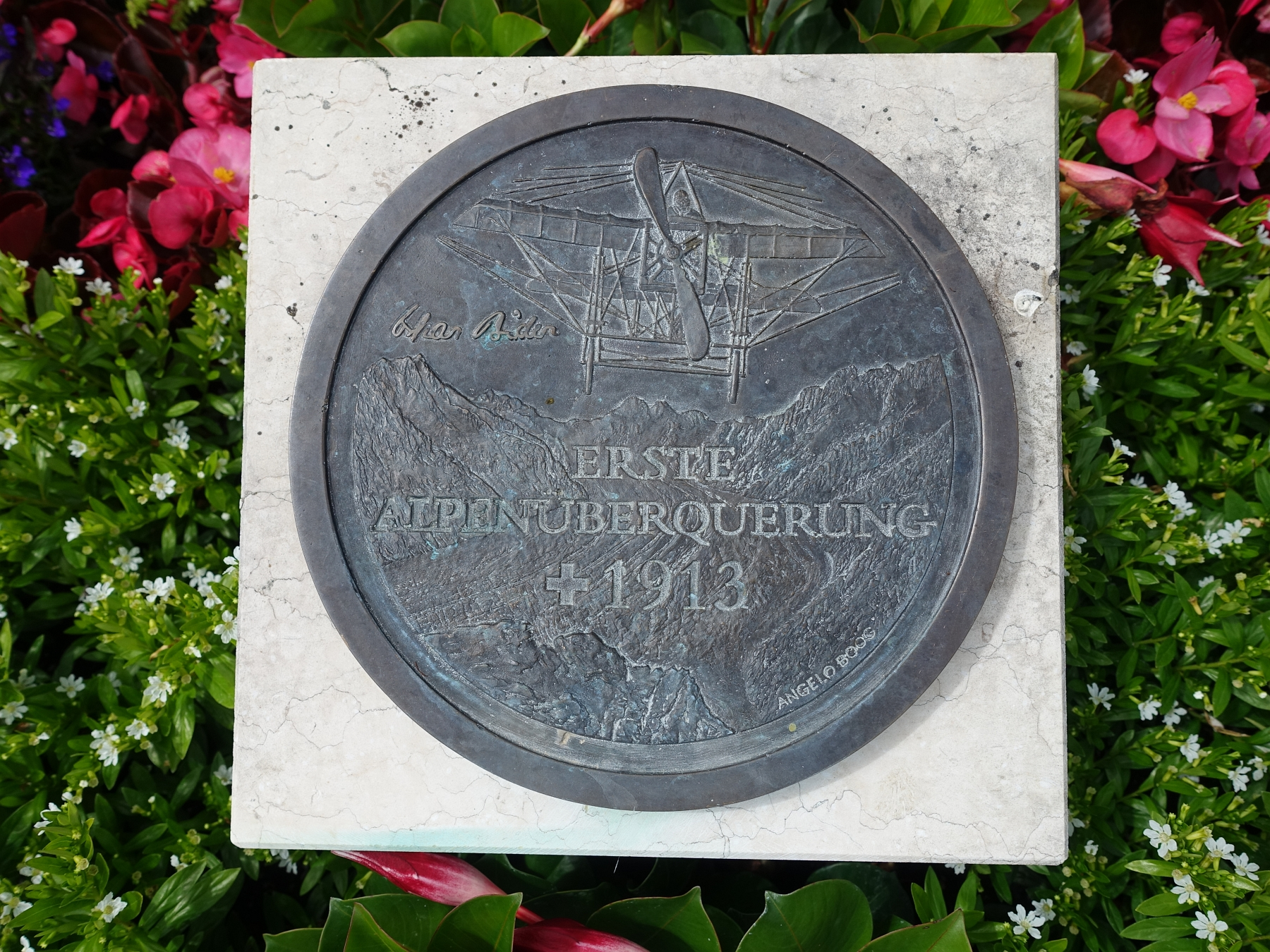 Oskar Bider (1891–1919) Flugpionier. Grab auf dem Friedhof von Langenbruck, Basel-Land, Schweiz.